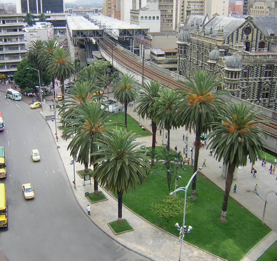 Plazuela Nutibara, Medellín, Colombia